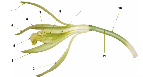 Vanilla planifolia, longitudonal section. Details: 1:bovenste sepaal; 2: rechtse sepaal; 3: linkse sepaal; 4: rechtse petaal; 5: lip; 6: Pollinia; 7: rostellum; 8: stigma; 9: gynostemium; 10:ovarium; 11:ovula